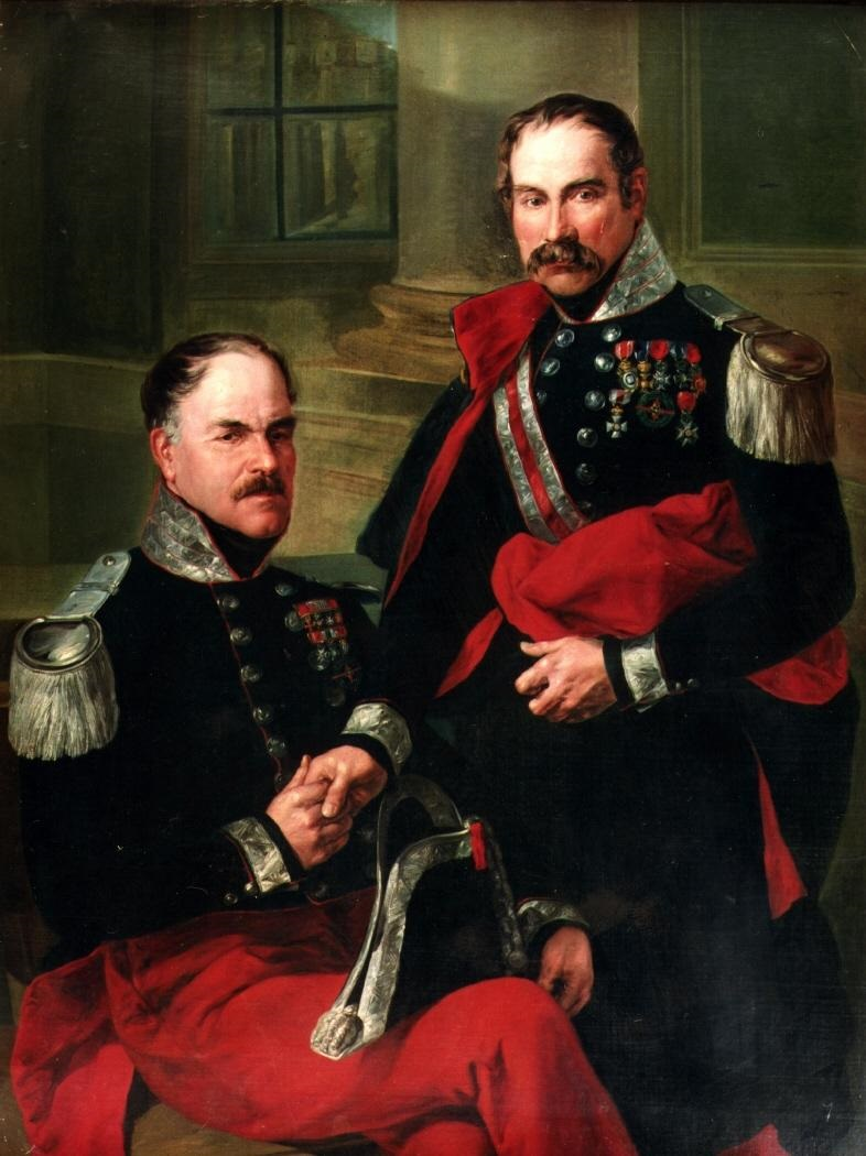 Retrato de los alabarderos José Díaz y Francisco Torán.